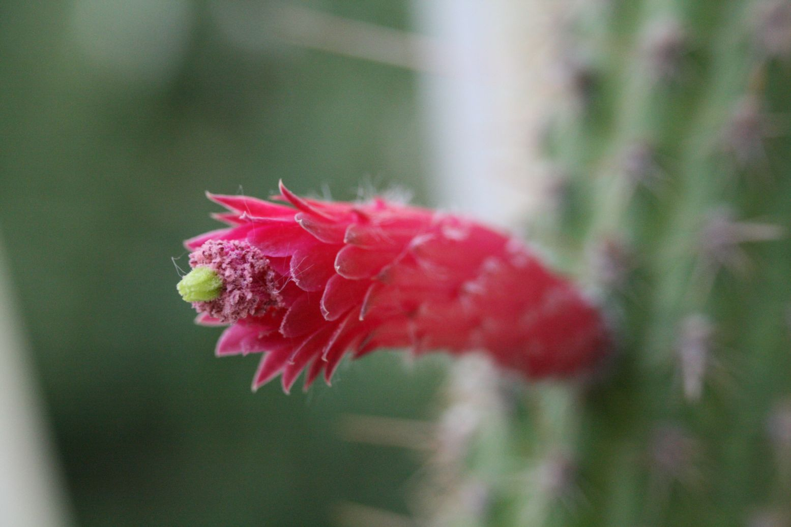 Cleistocactus baumannii (Trichocereeae; Cactaceae; Planta) virága